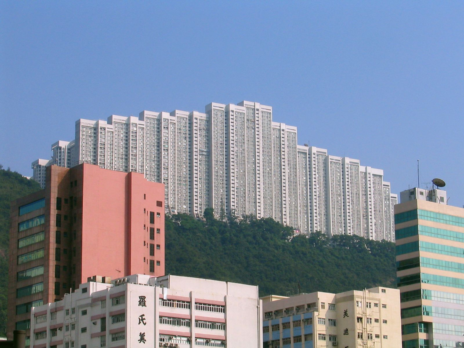 華景山莊 Wonderland Villas